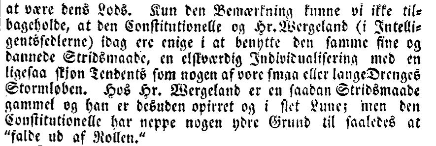 Utdrag fra en avisartikkel som beskriver Henrik Wergeland som "i slet Lune"